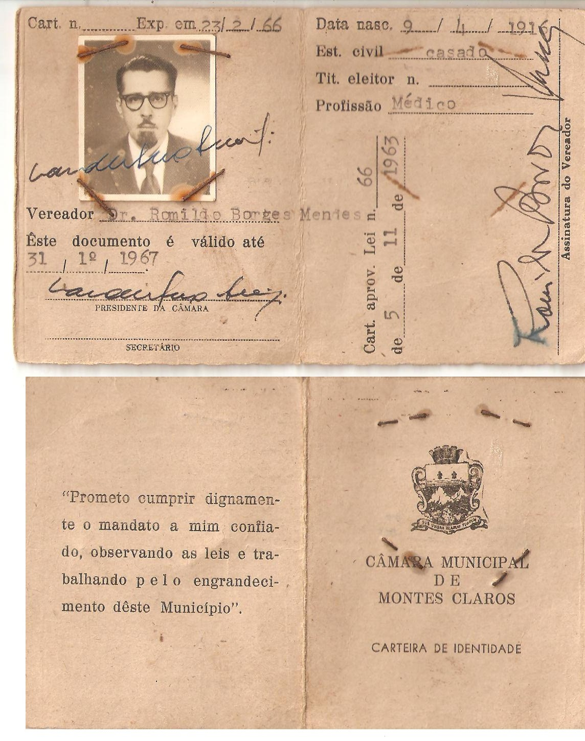 Arquivo Memorial Dr. Romildo Borges Mendes